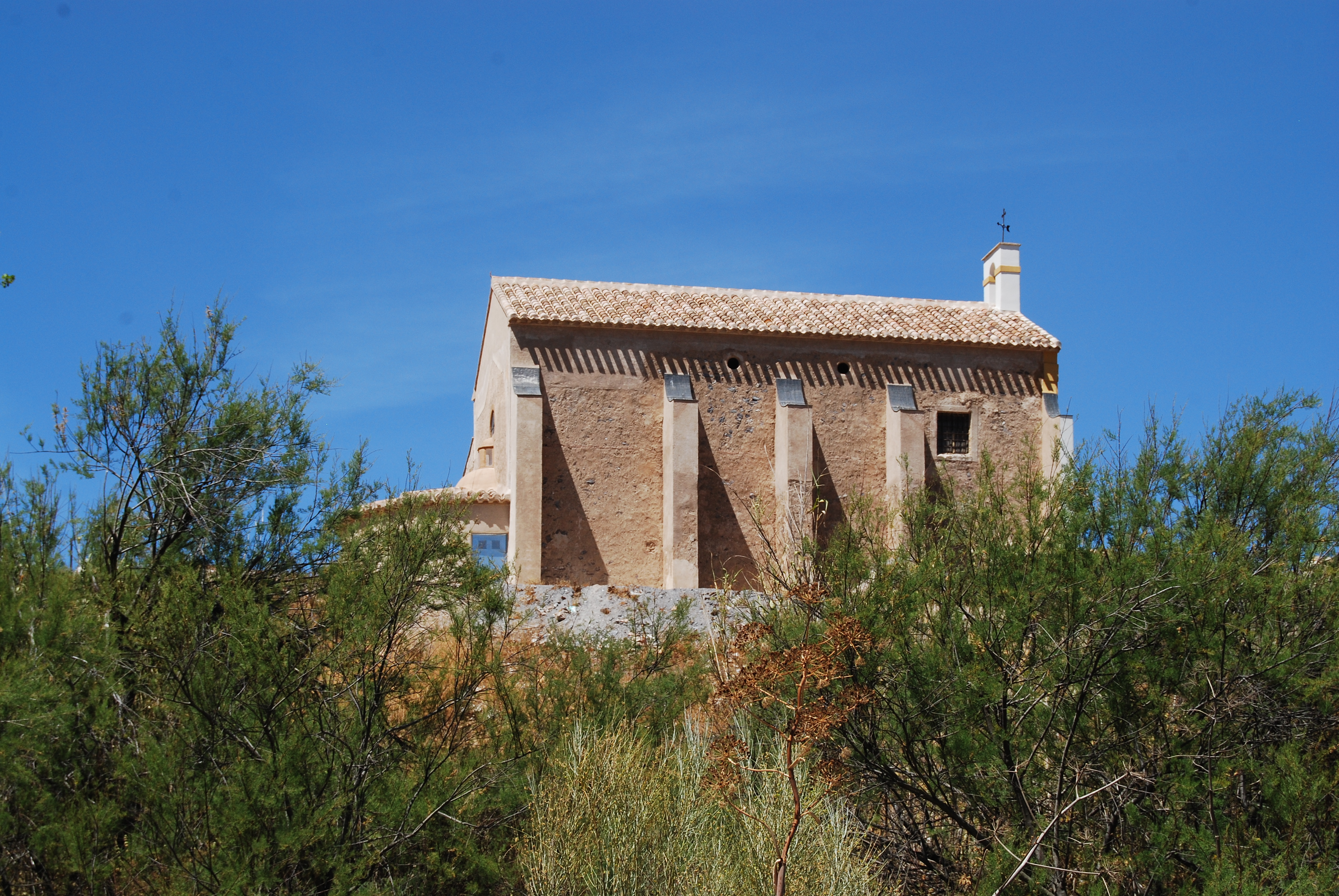 Vista lateral de la ermita